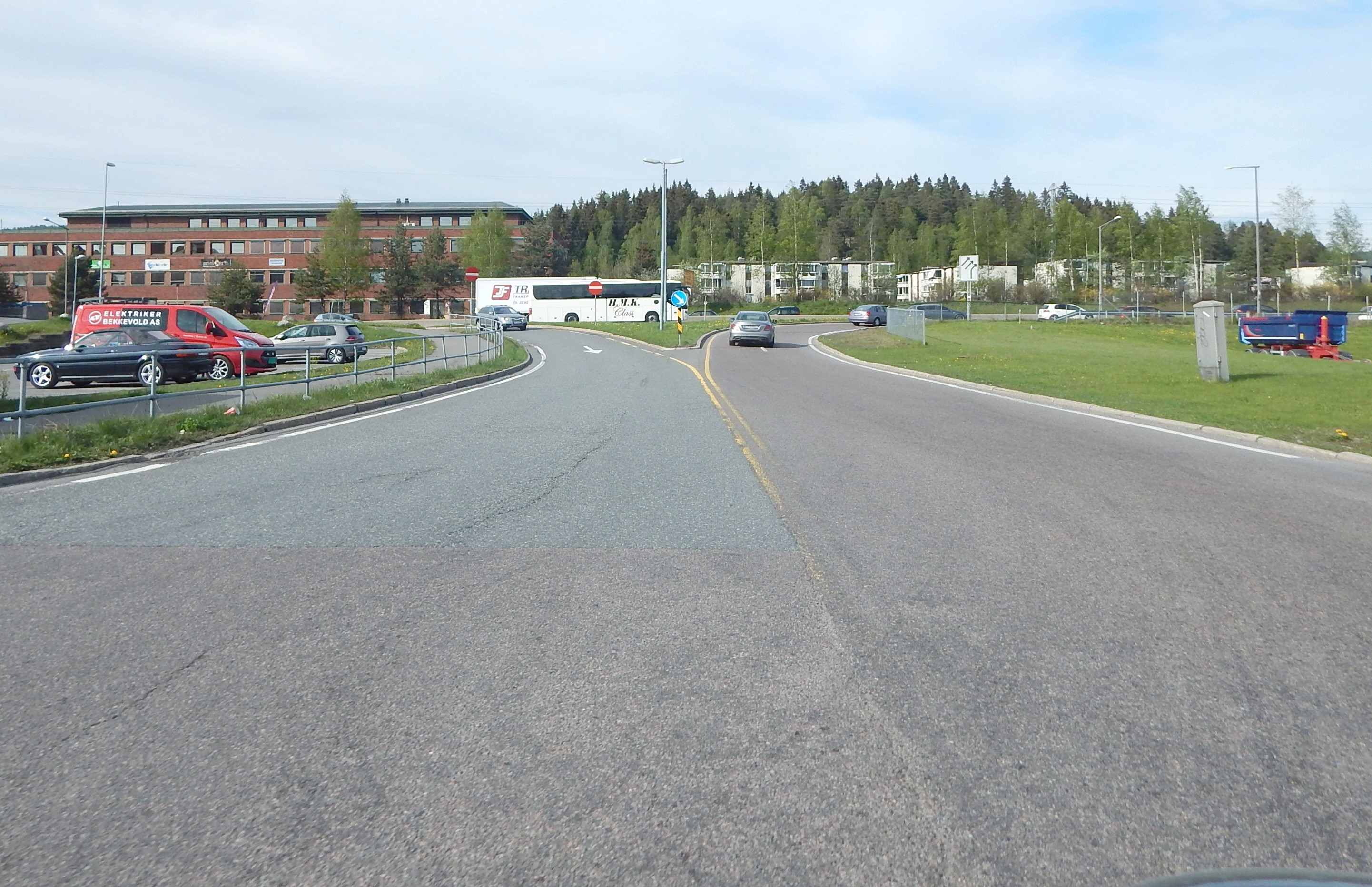 Sigurd Astrups vei